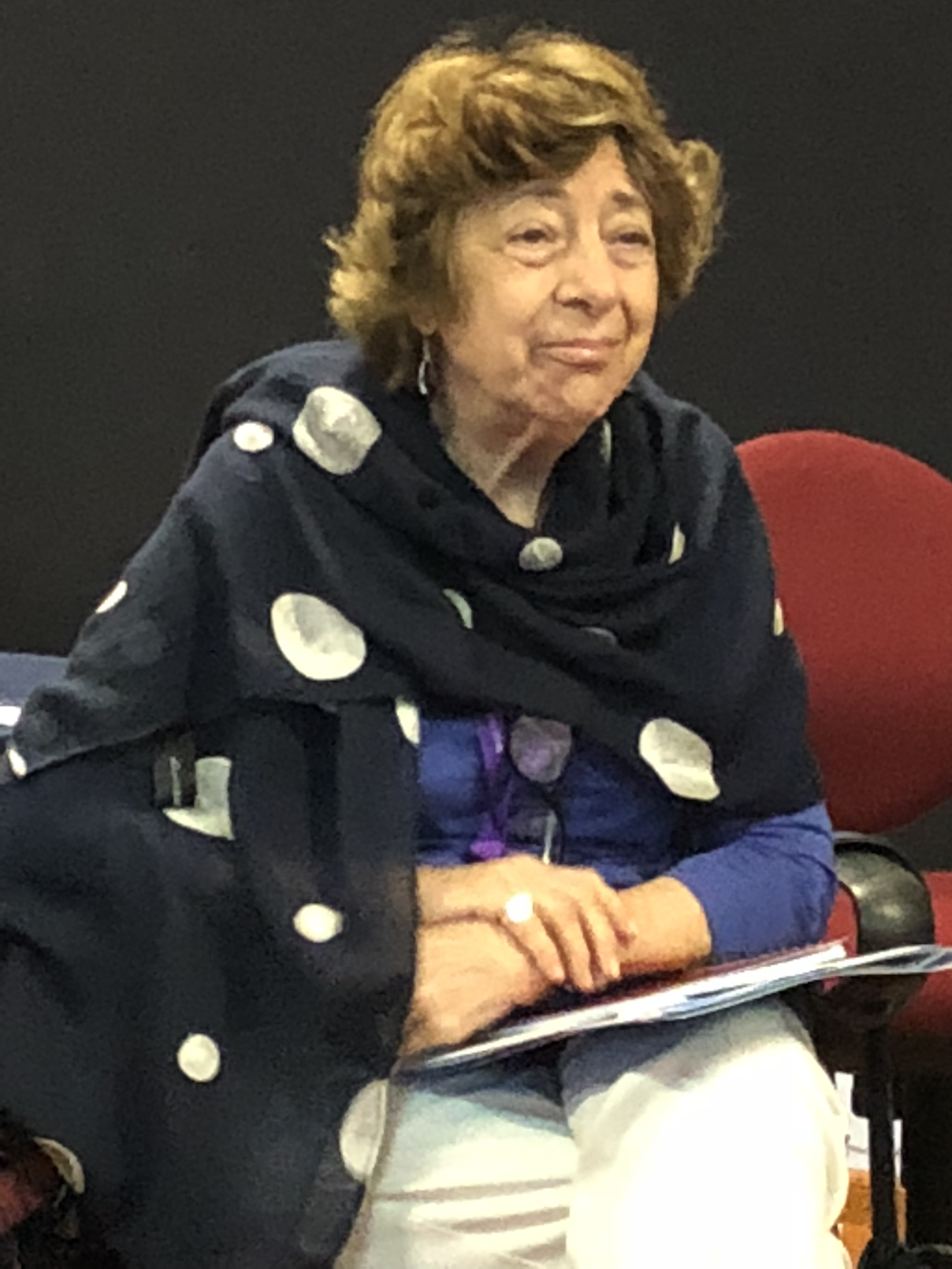 Guatemala Unifem